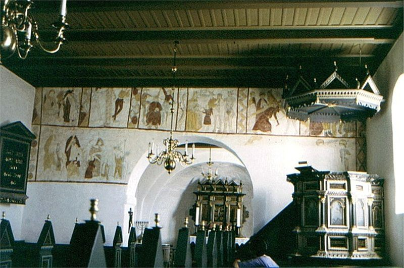 Hinge Kirke,Triumfvæg; Silkeborg Kommune, Denmark